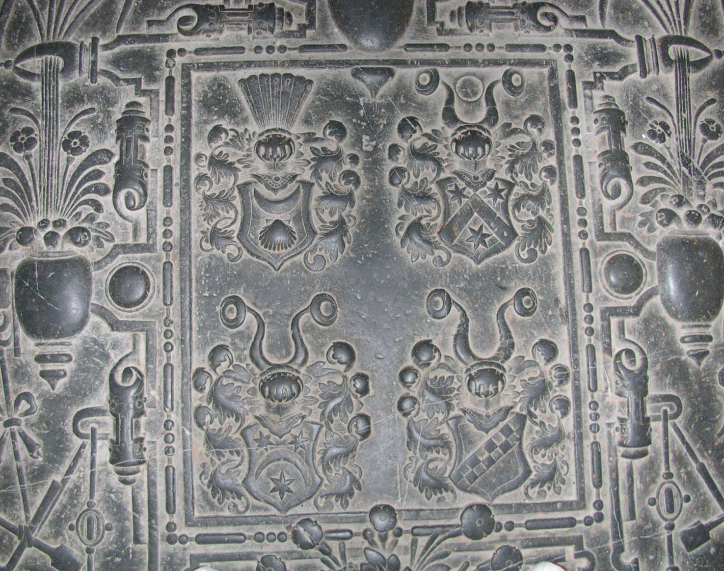 Iver Jenssøn til Fresje - gravplate i Hedrum kirke